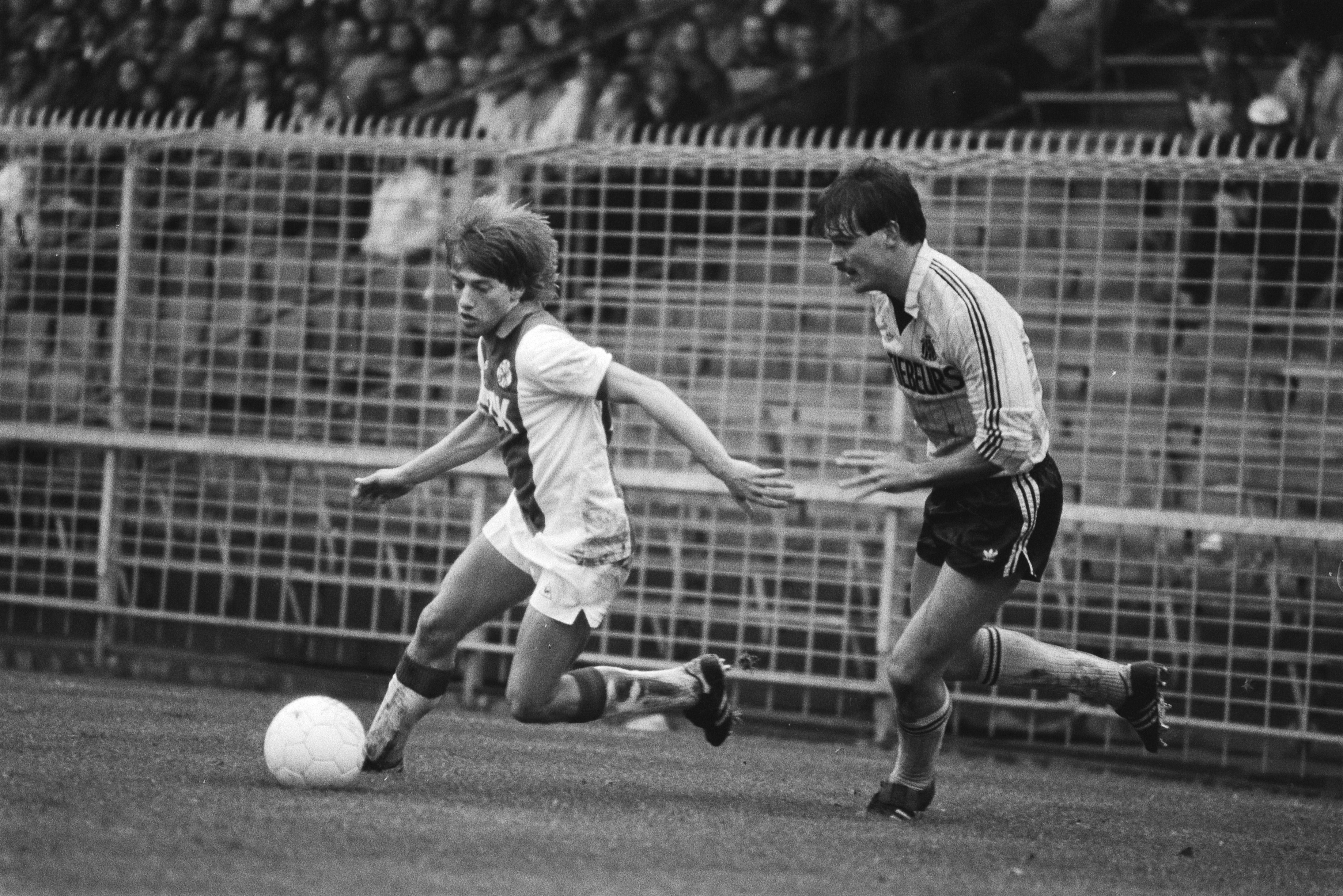 L'ajacide Jesper Olsen (à gauche) dribble Peter van de Ven. Photographie par Rob Bogaerts / Anefo.